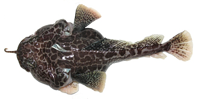 Turquoise plunderfish Pogonophryne tronio Shandikov, Eakin et Usachev, 2013, holotype, male (dorsal view), 290 mm TL, 234 mm SL, Ross Sea, Antarctica